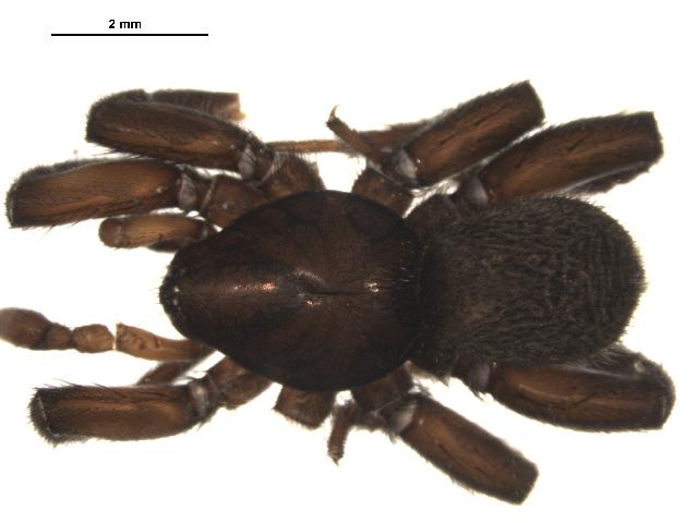 Gnaphosa borea